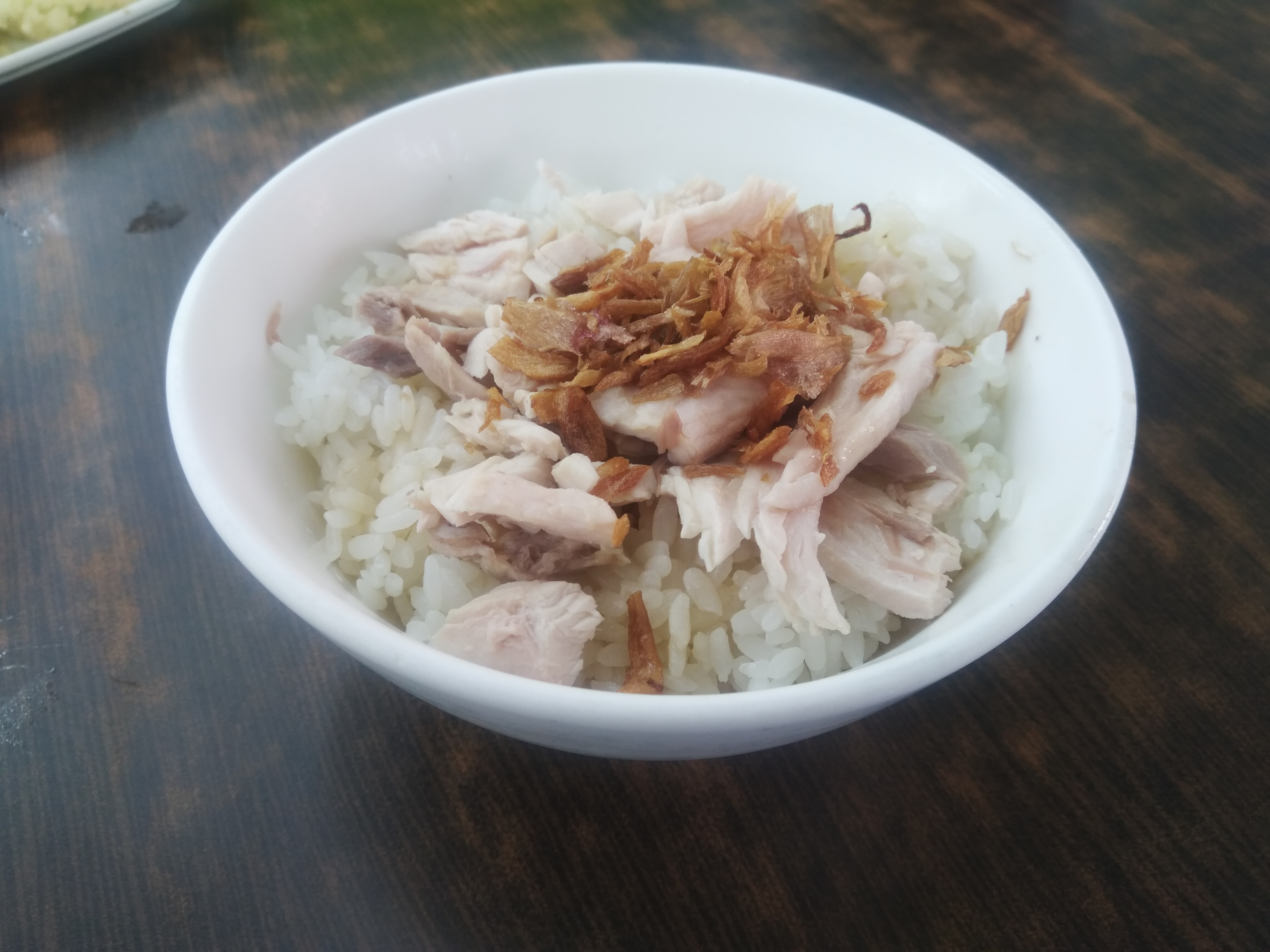 火雞肉飯